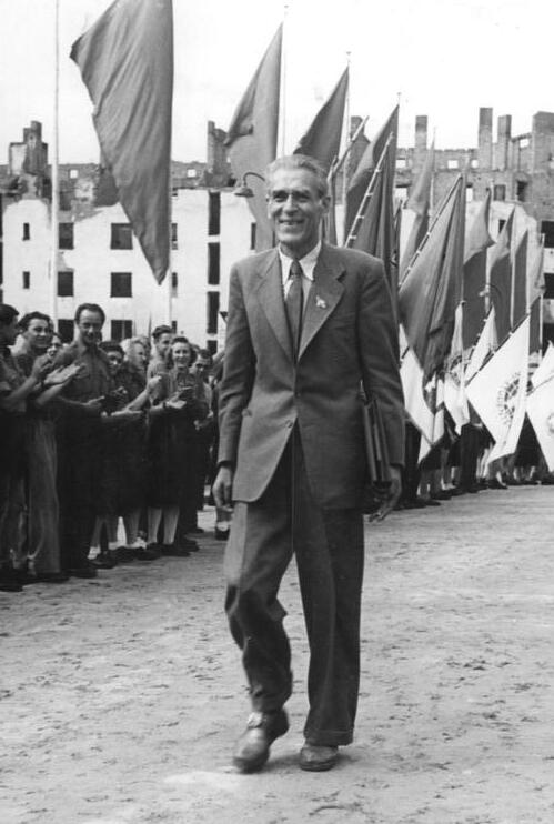 III.Parteitag der SED vom 20.-22.7.1950. Vom 20.-22.7.1950 findet in Berlin in der Werner-Seelenbinderhalle der III.Parteitag der Sozialistischen Einheitspartei Deutschlands statt. UBz: Max Reimann, der Vorsitzende der KPD, trifft zum Parteitag ein. Aufn.: Illus-Heilig 10 Leu. 7293-50 20.7.50